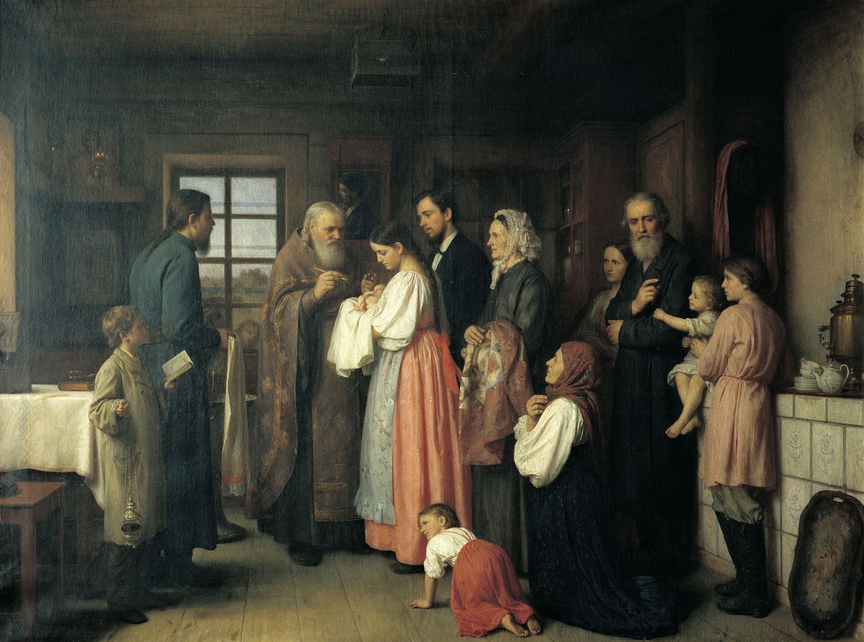 Карнеев Аким Егорович - Крестины